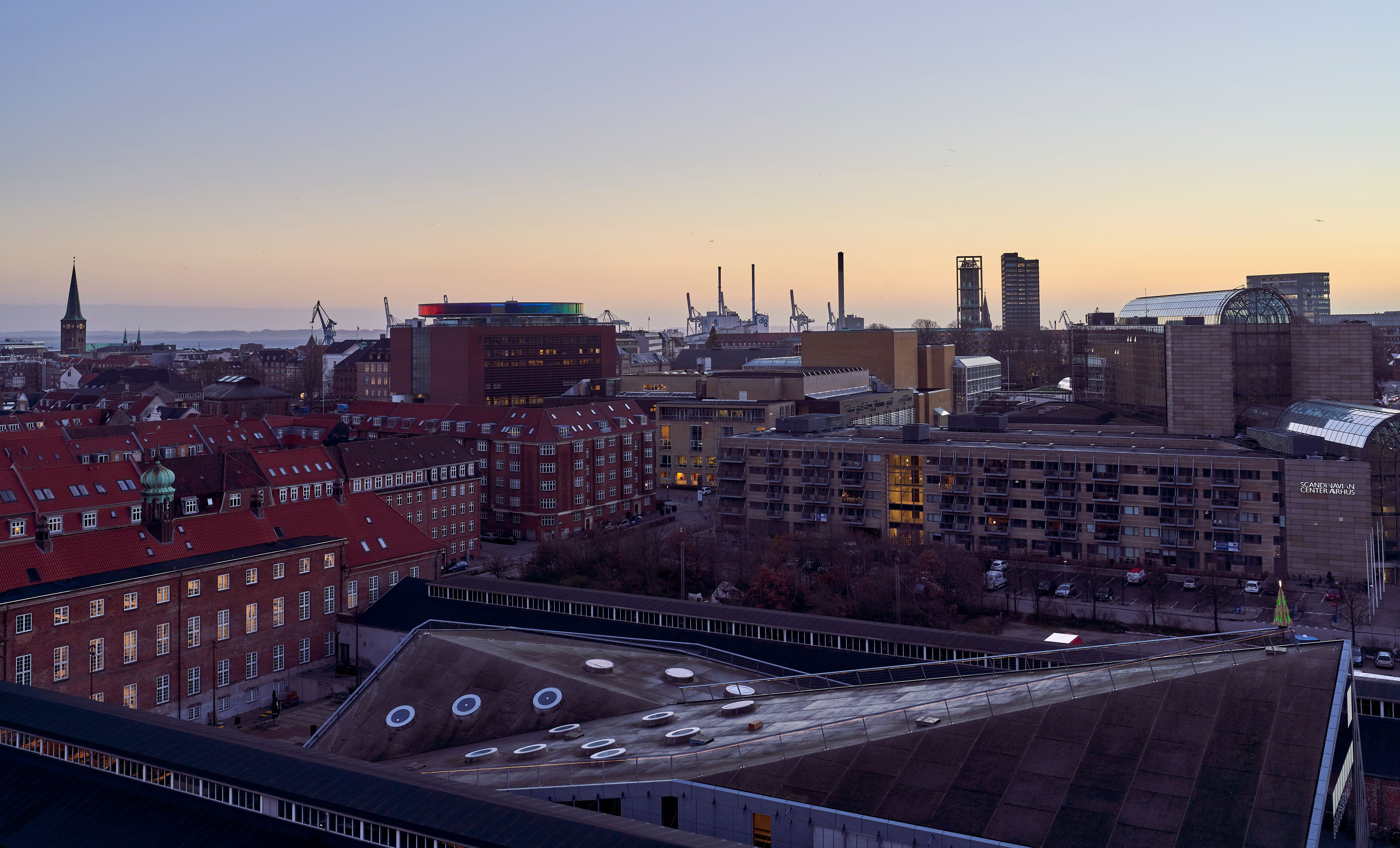 Et billede af både det gamle Æggepakkeri og en af de nye bygninger.